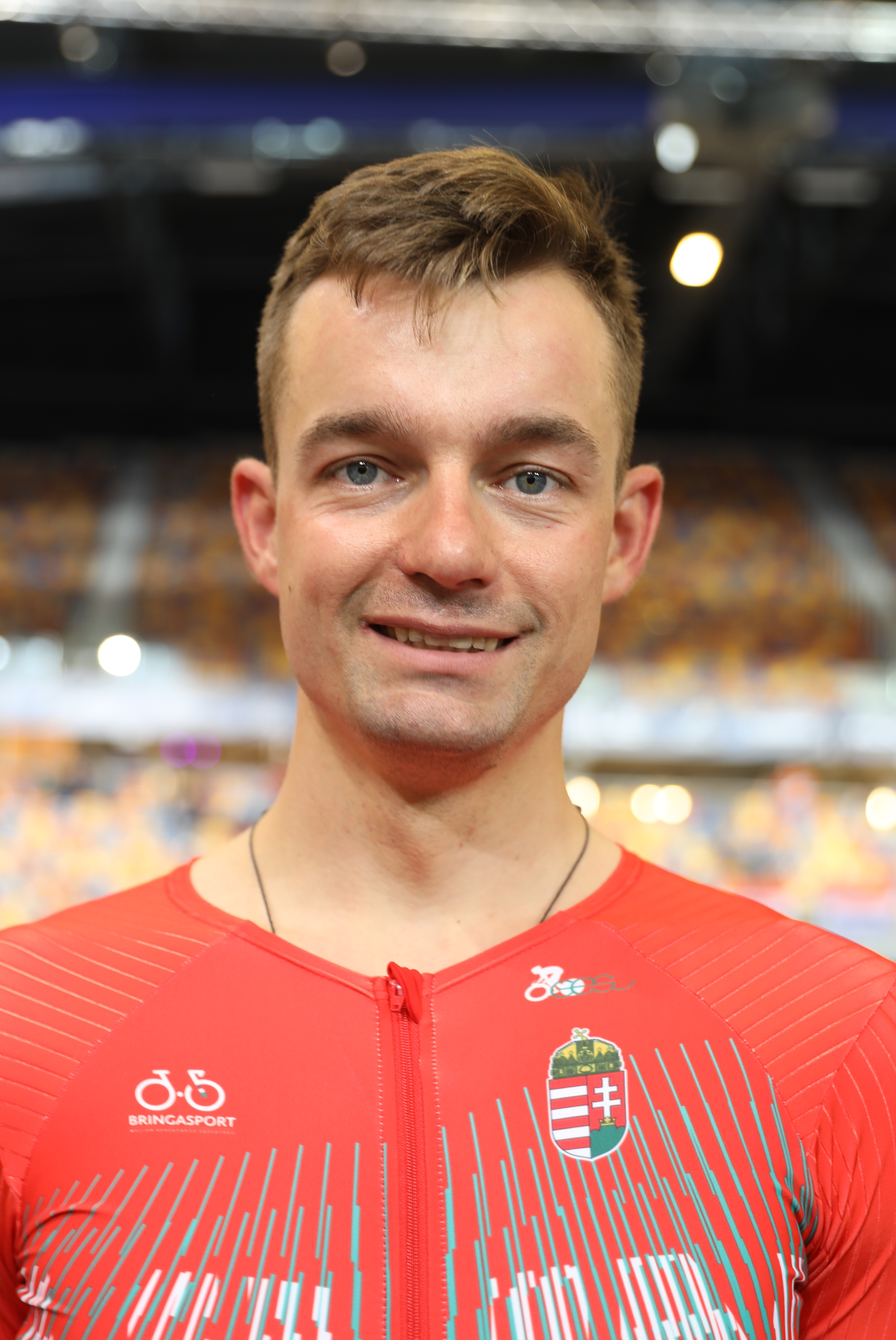 Krisztián Lovassy, Radsportler aus Ungarn